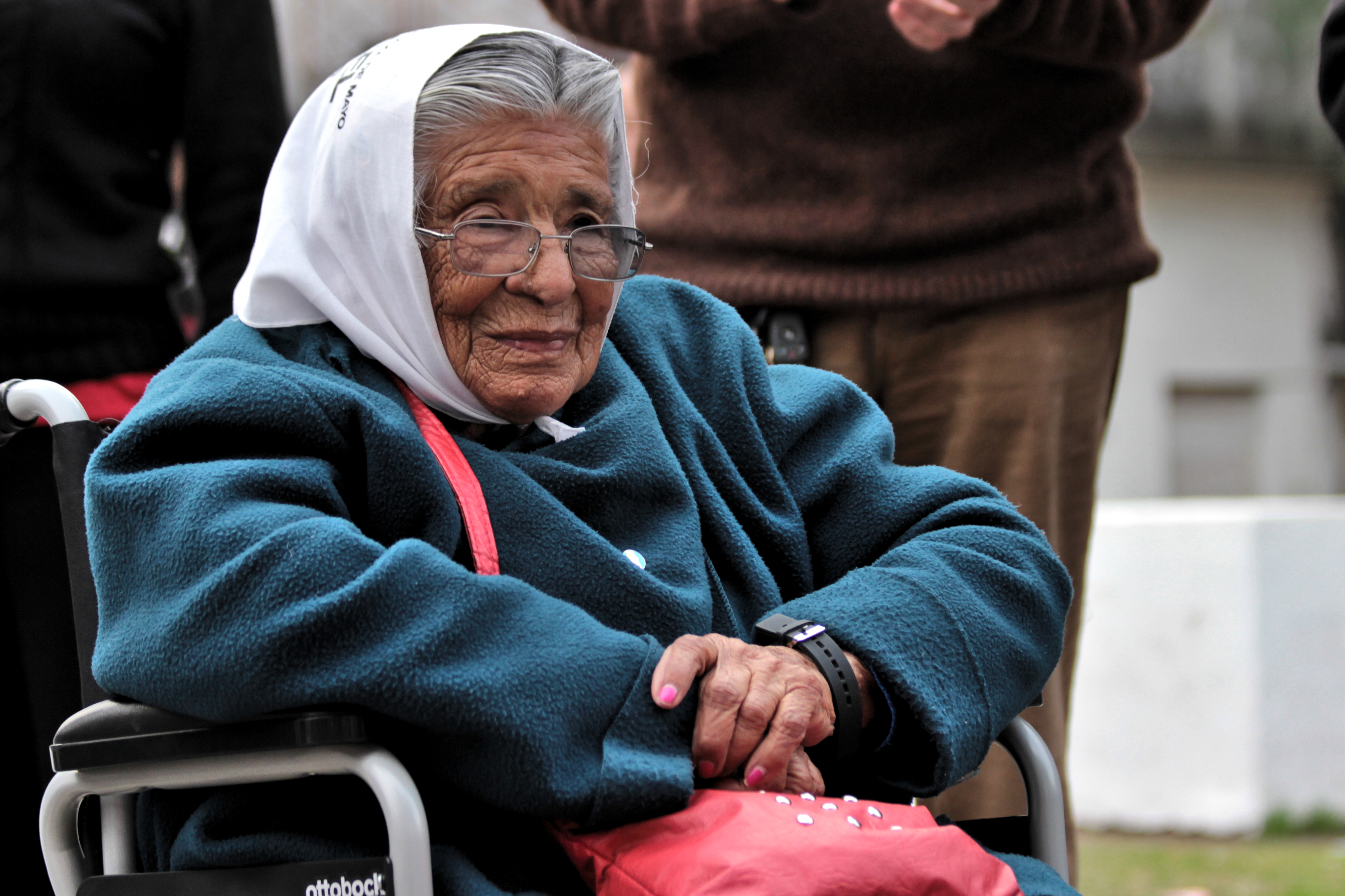 Otilia Leoncia Acuña, Madre de Plaza de Mayo, durante el acto en la ciudad de Santa Fe en conmemoración de las 2000 Rondas de Madres de Plaza de Mayo, realizado el jueves 11 de agosto de 2016.